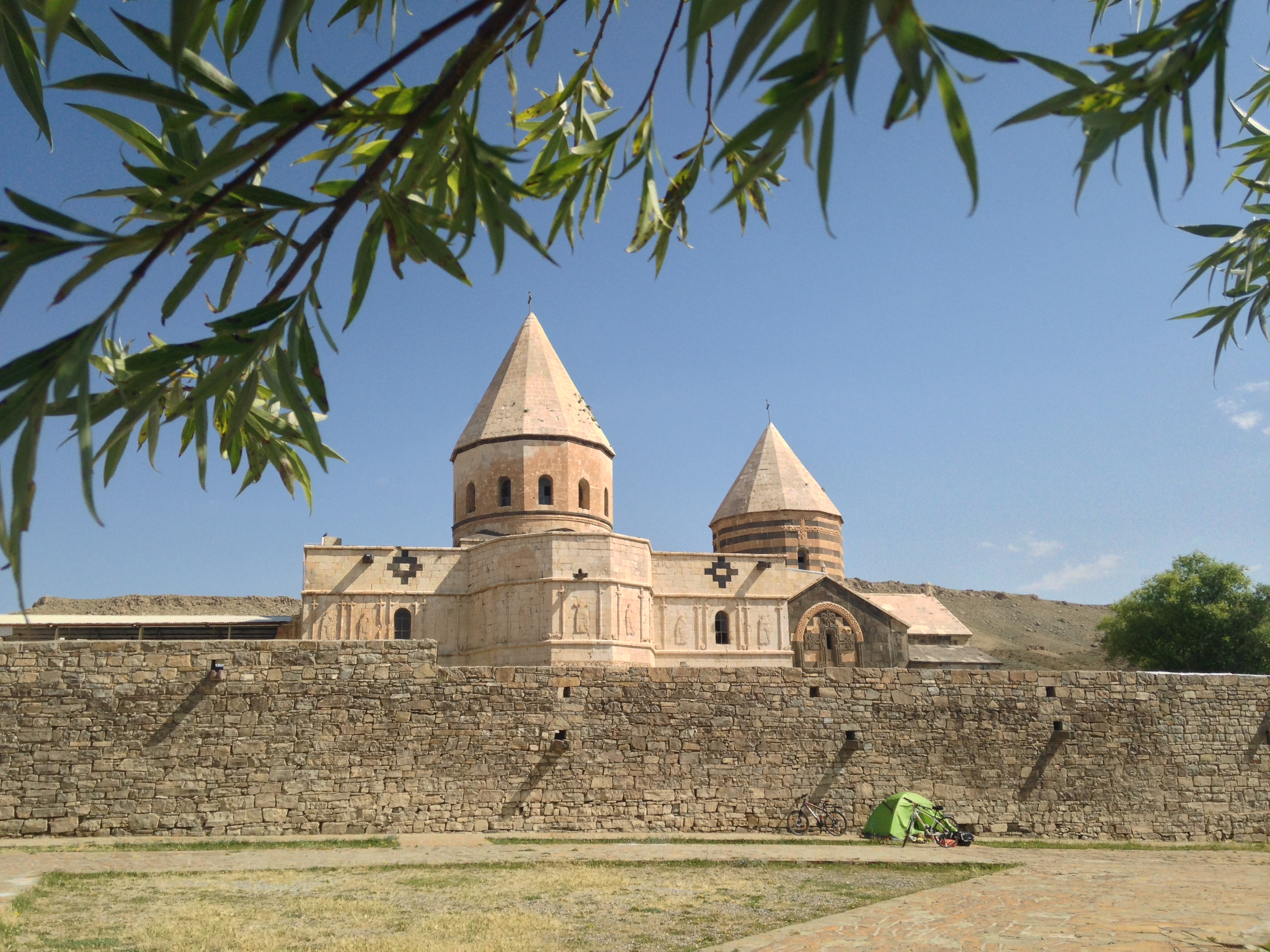 کلیسای طاطاووس (قره کلیسا)